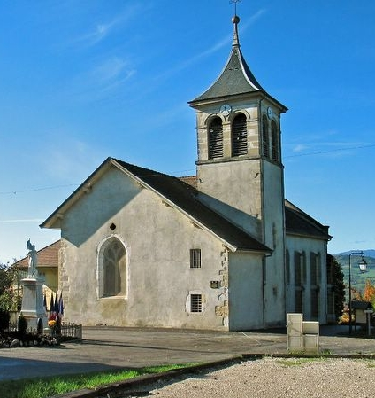 Eglise de Choisy